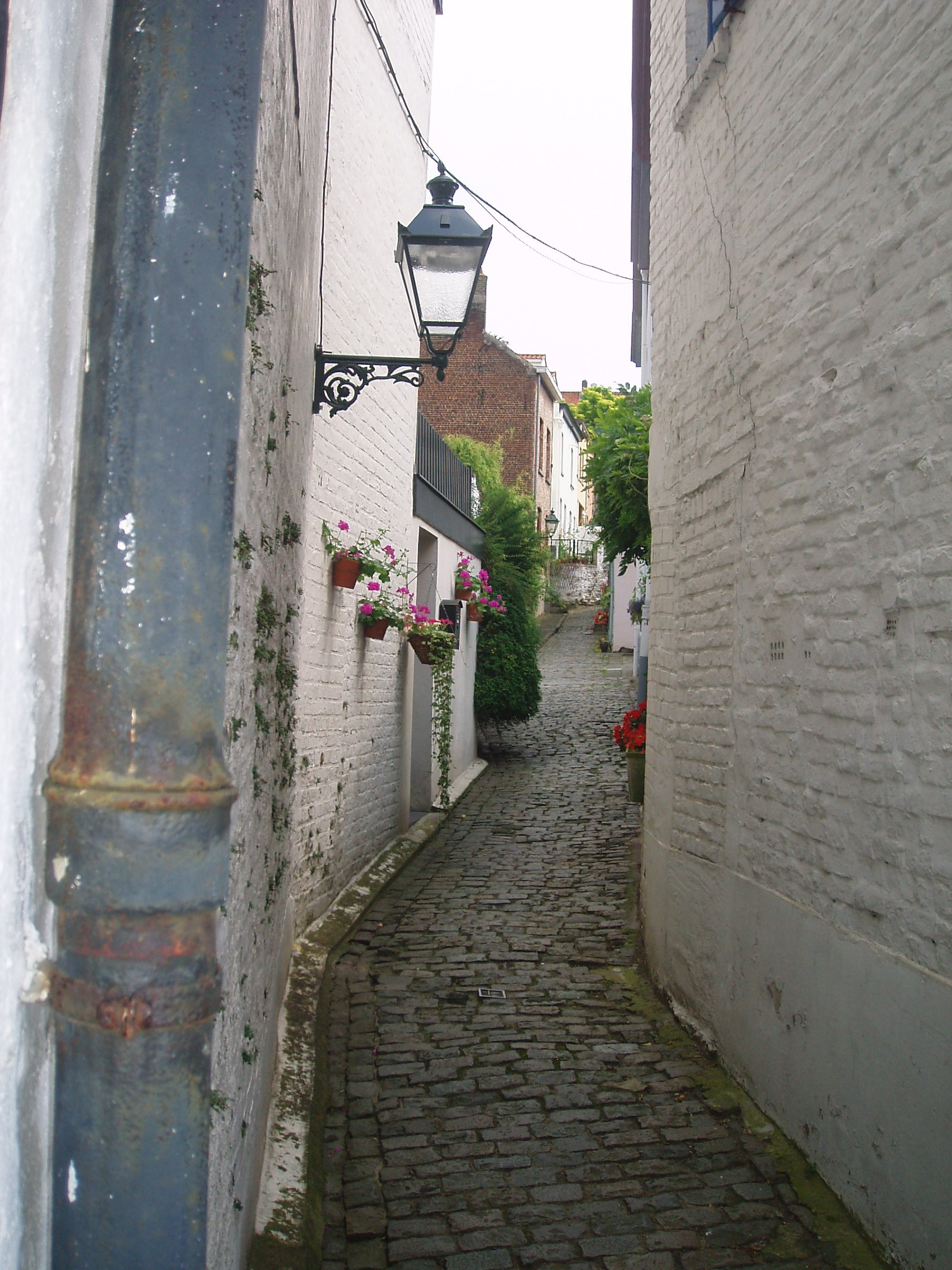 rue de la Pente Auderghem Belgium